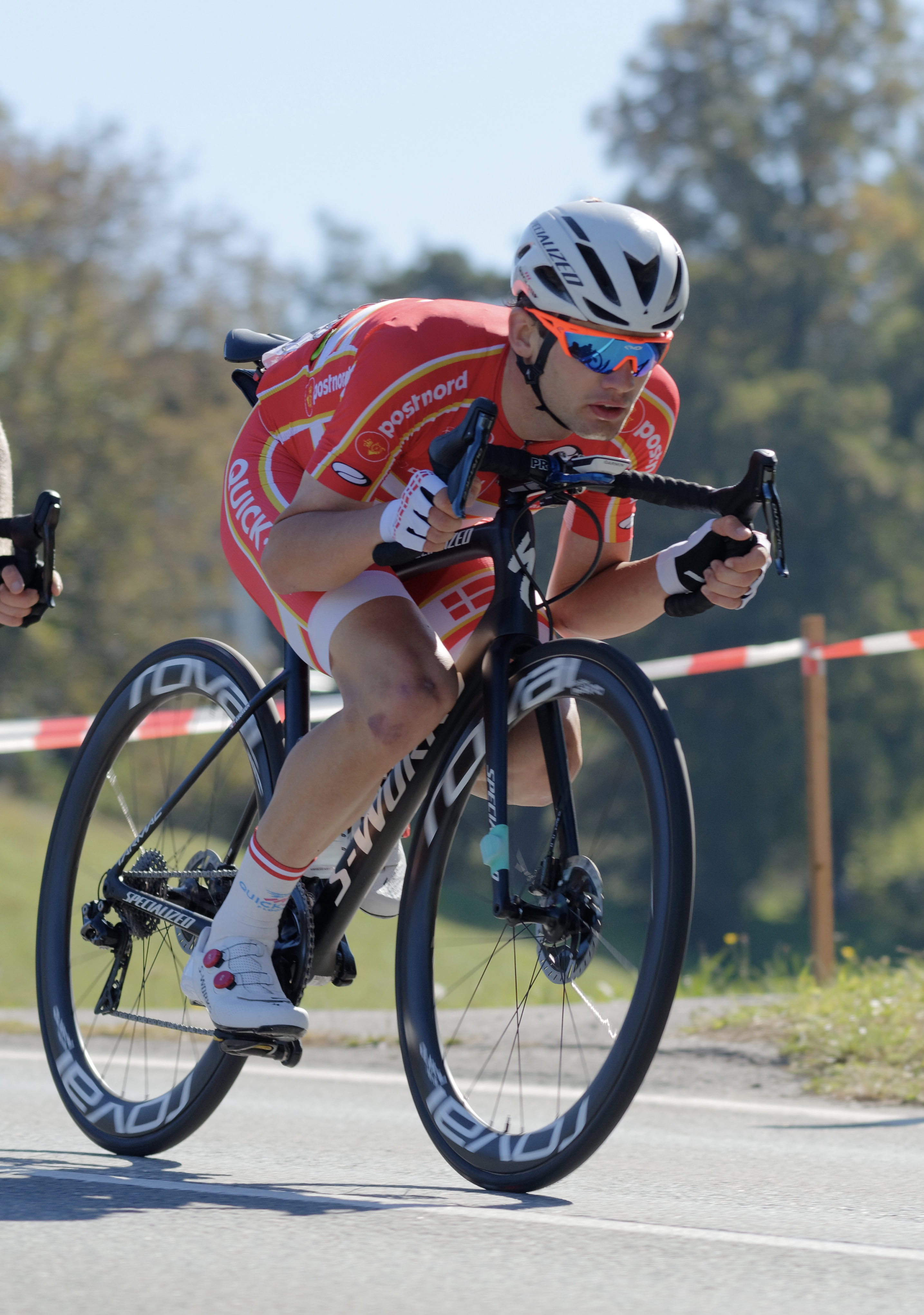 D71_6777_DxO